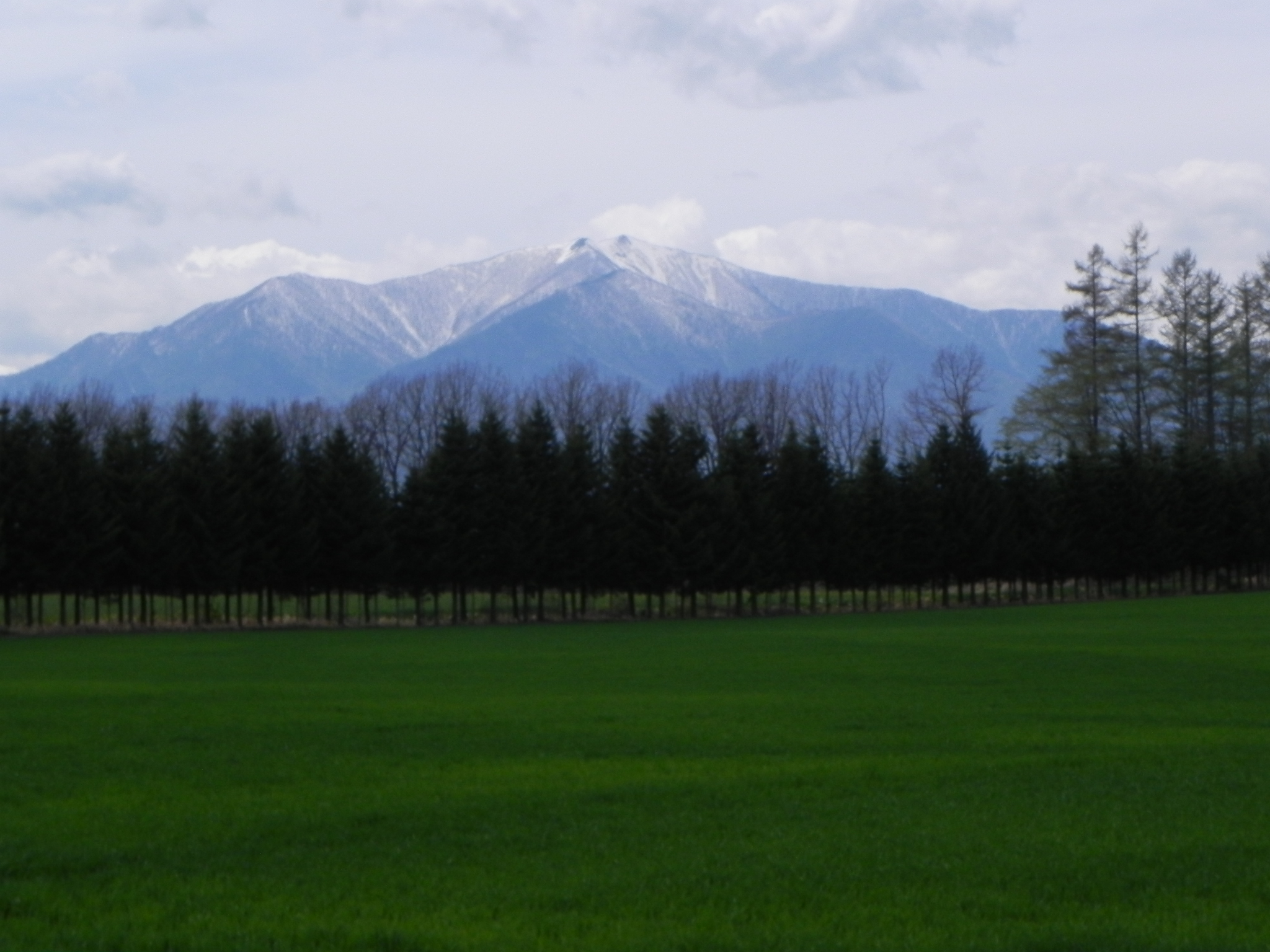 十勝幌尻岳（北海道帯広市より撮影）